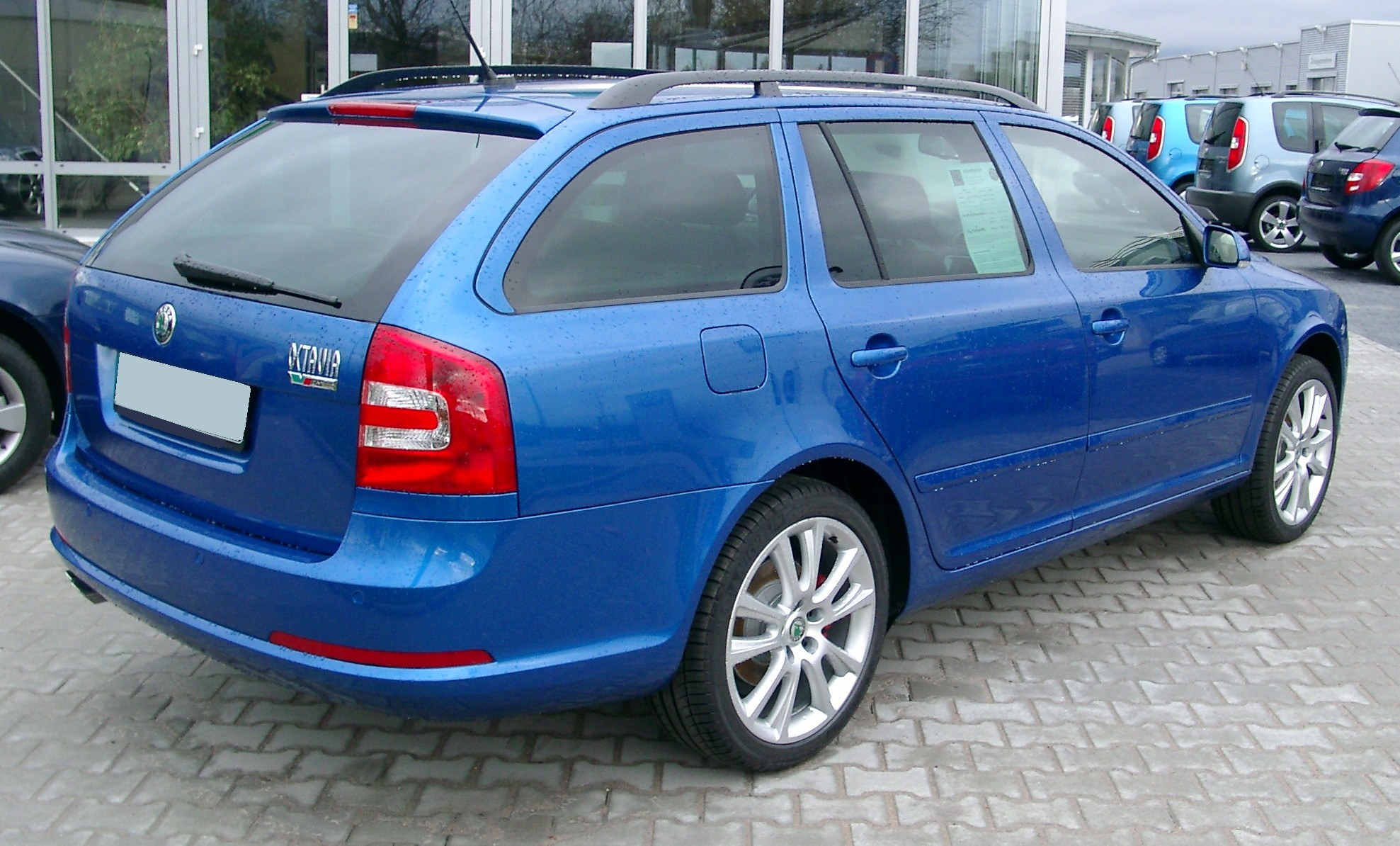 Škoda Octavia Combi, 2. Generation